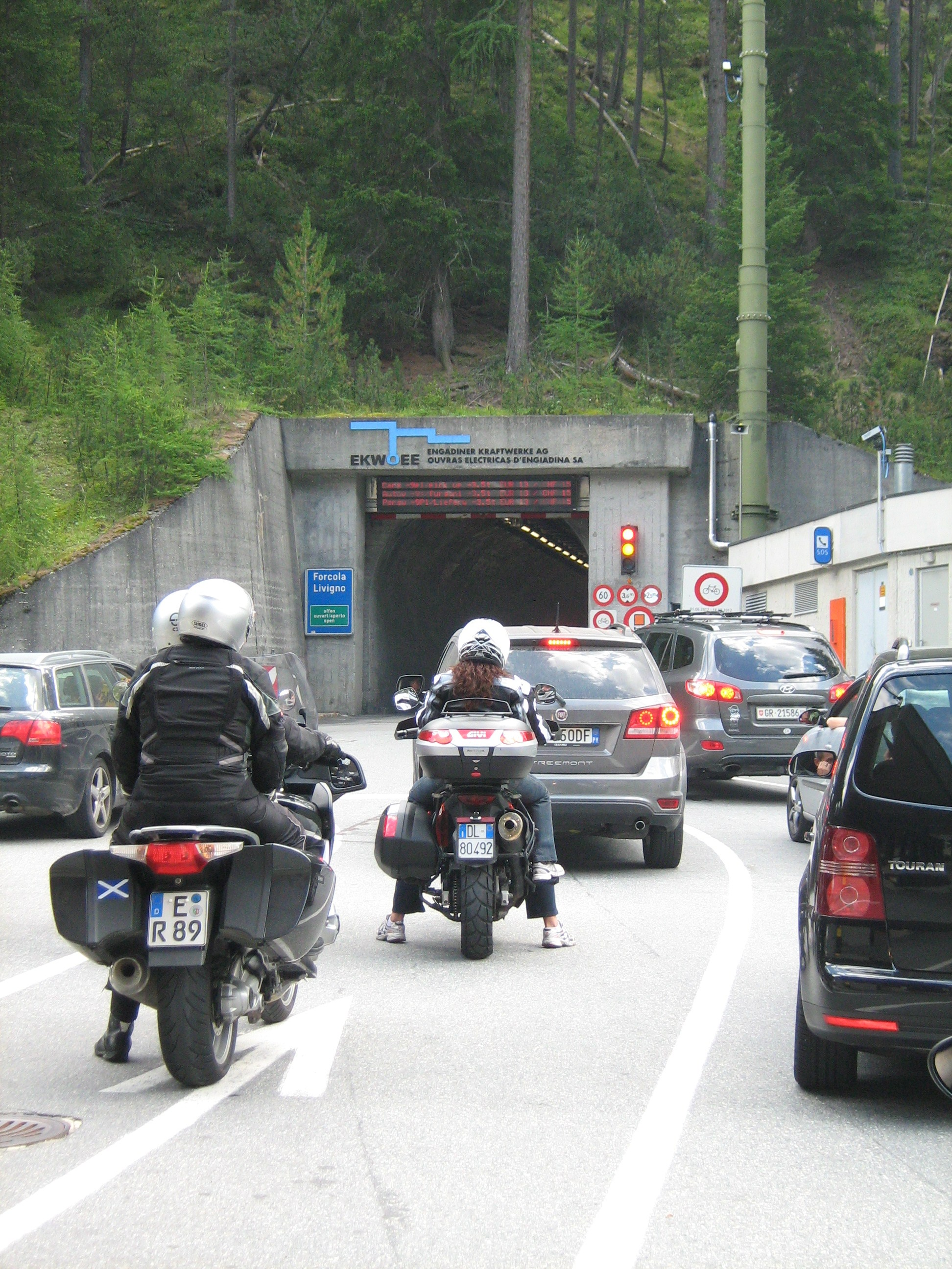 Indkørslen til tunnelen gennem Munt la Schera, som forbinder Schweiz med Livigno i Italien. 14. august 2012.